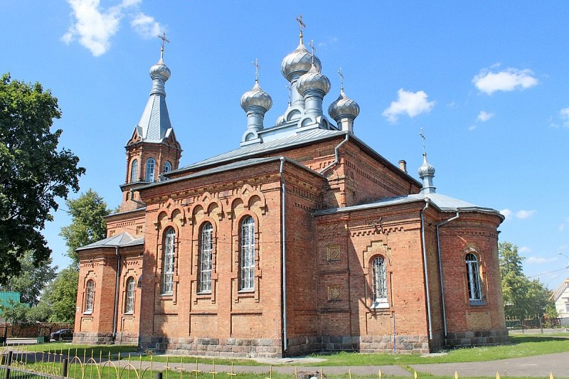 Лунінец. Свята-Крыжаўзвіжанская царква